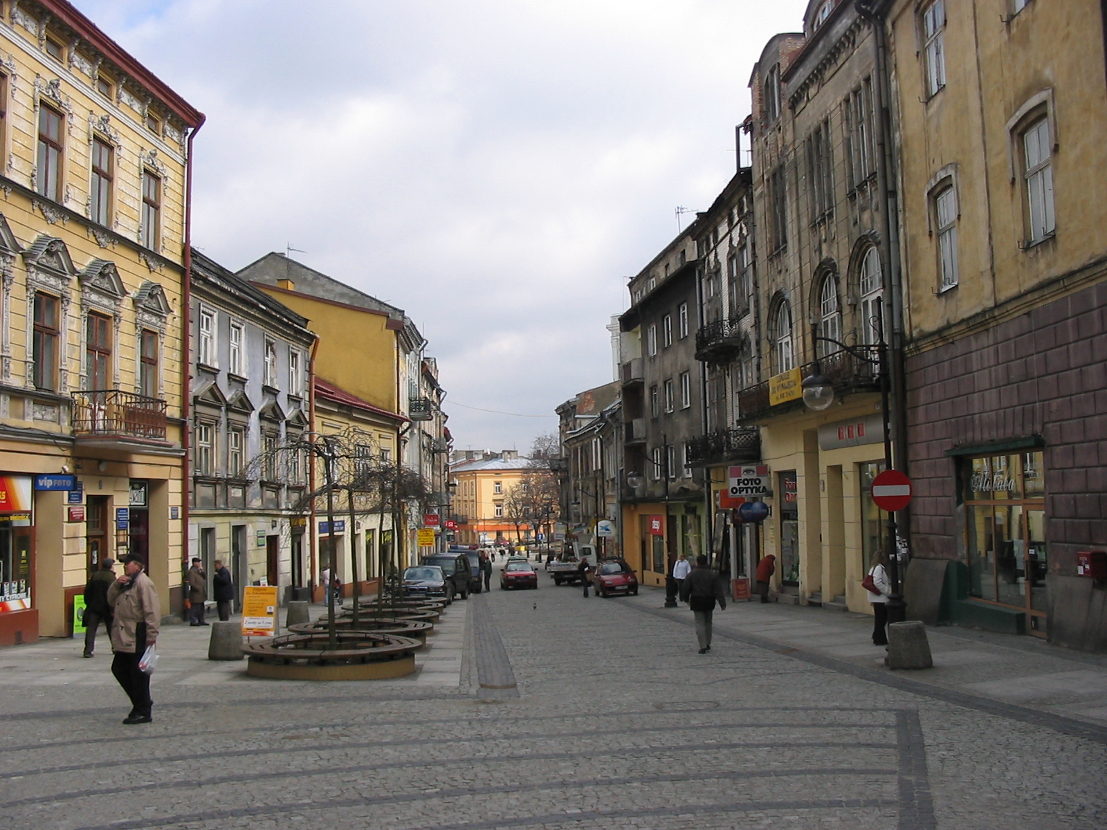 ul. Franciszkańska w Przemyślu